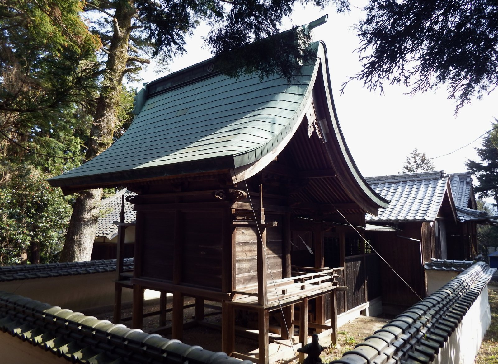 松山市の生目神社